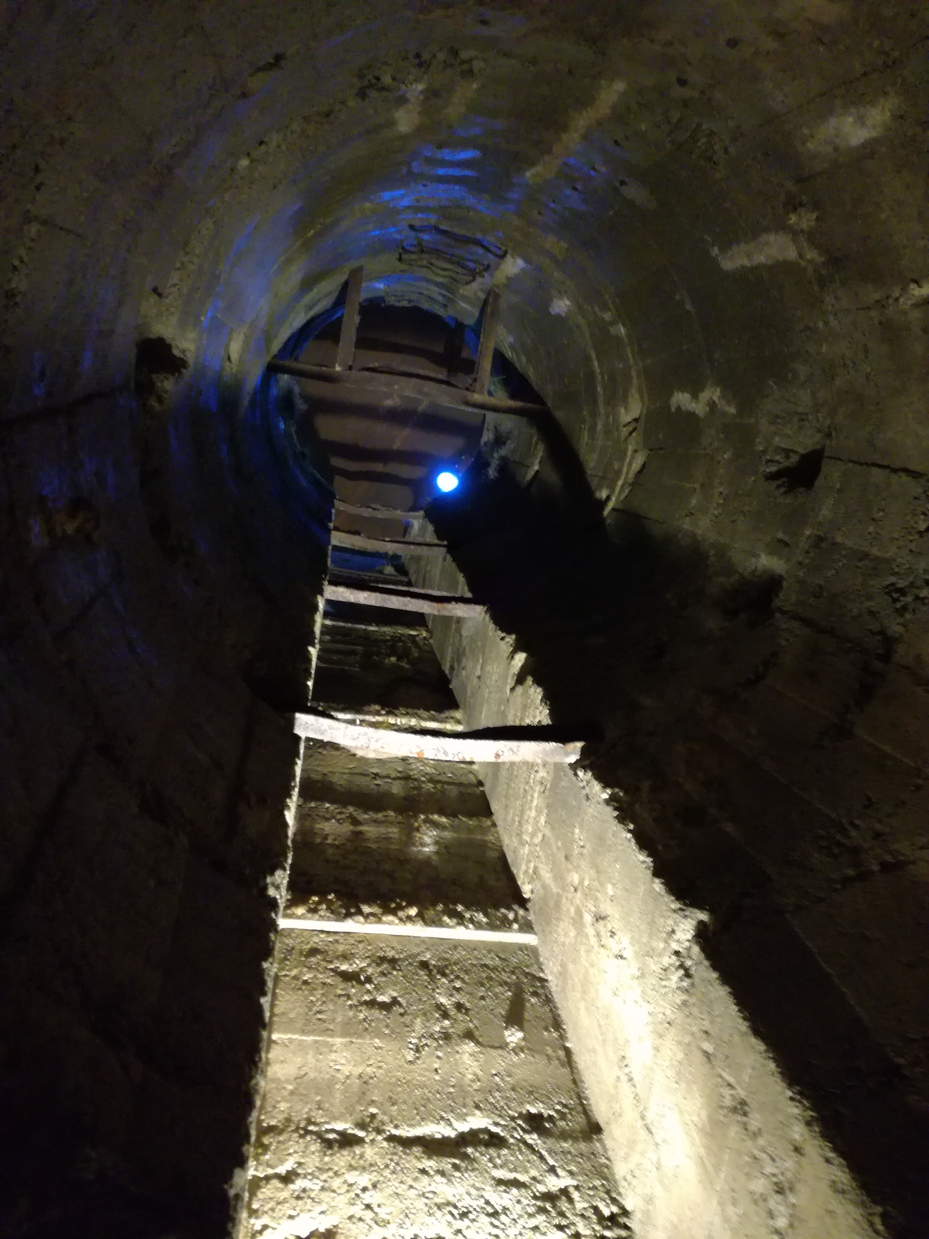 Werk Busa Grande - Gesch�ützturmbrunnen